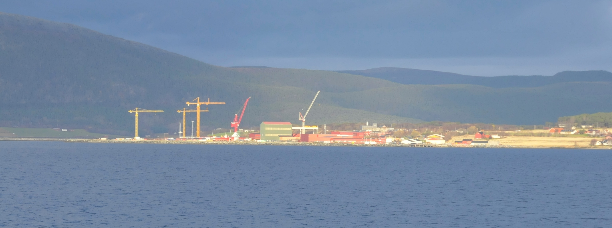 Fosen Yards Schiffsbauwerft vom Hurtigruten-Schiff aus im November 2014